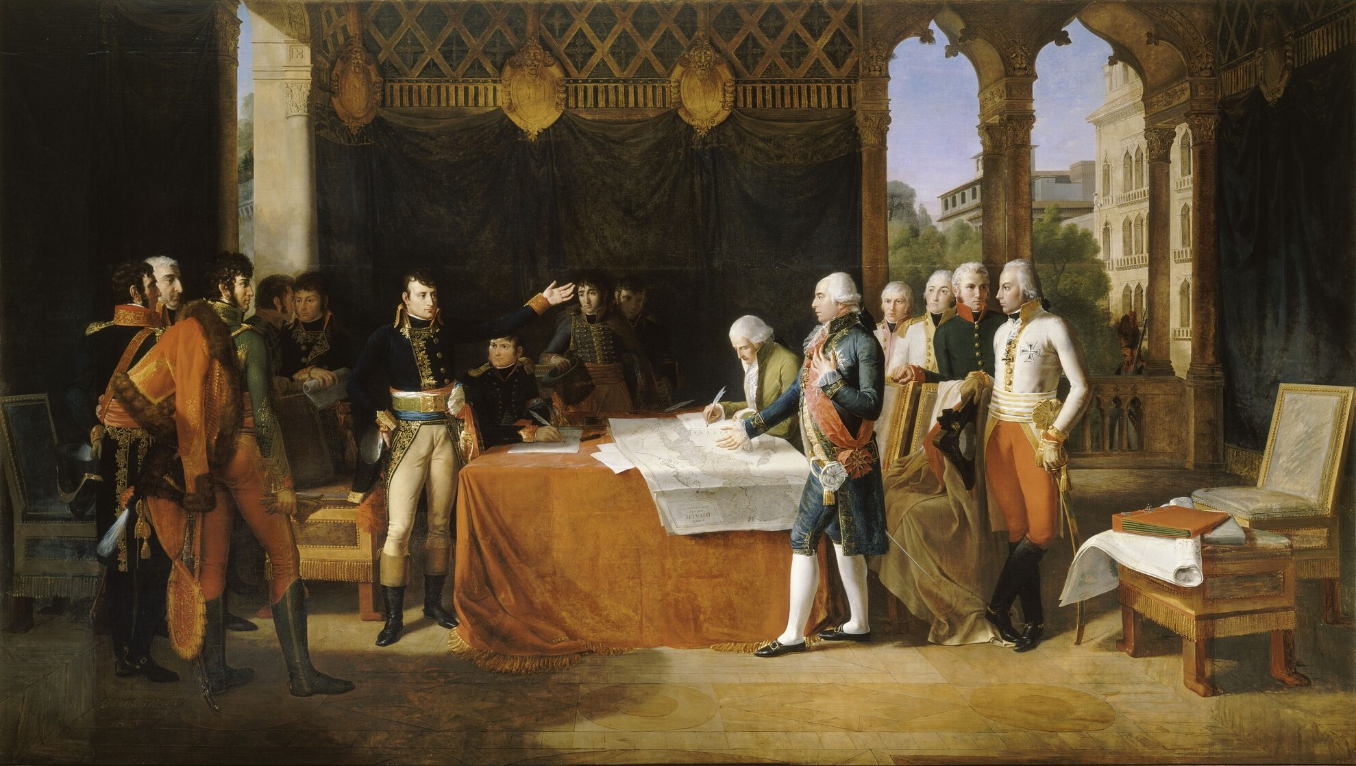 Traité de Leoben, 17 avril 1797.